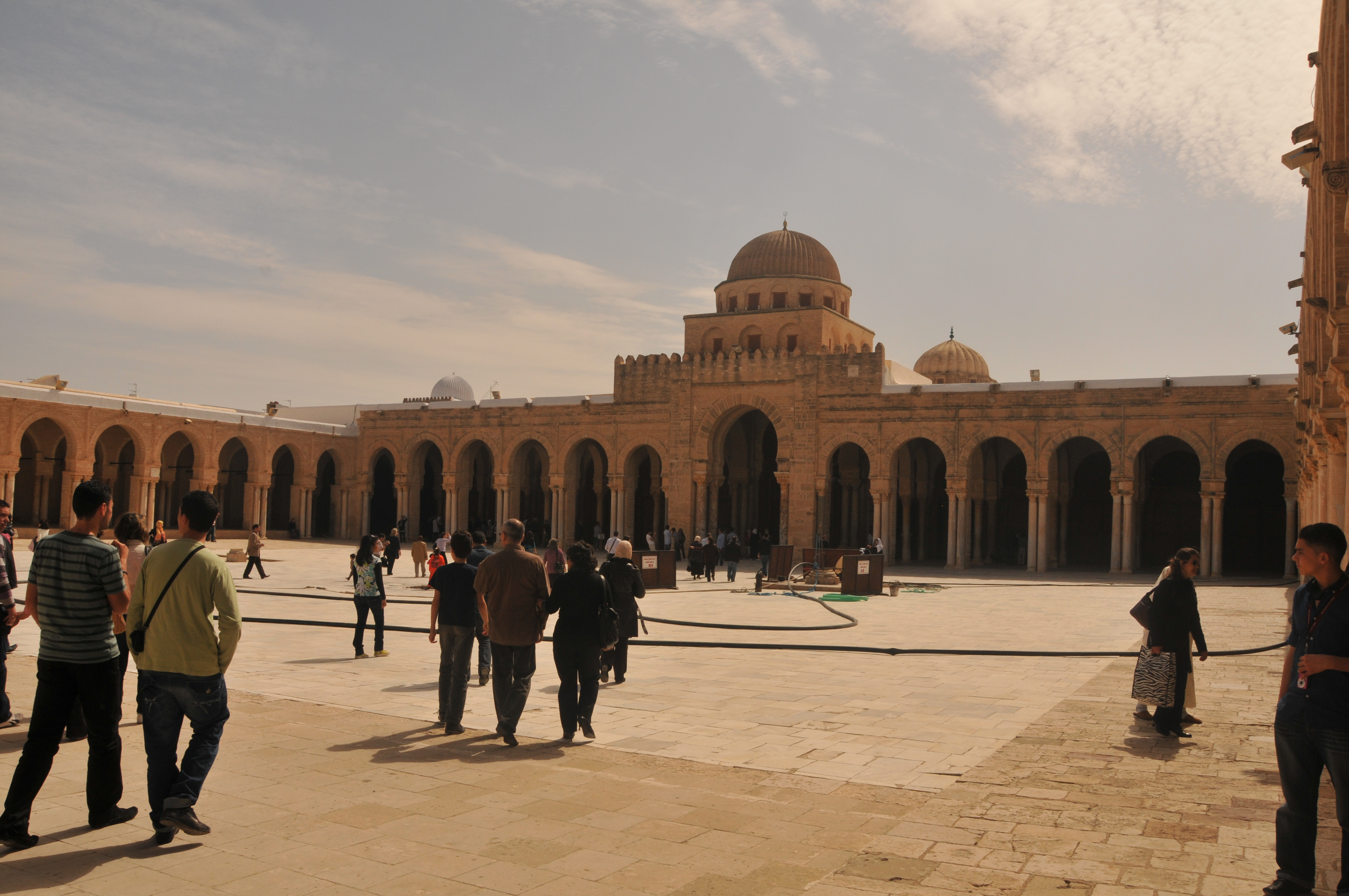 Grande Mosquée de Kairouan